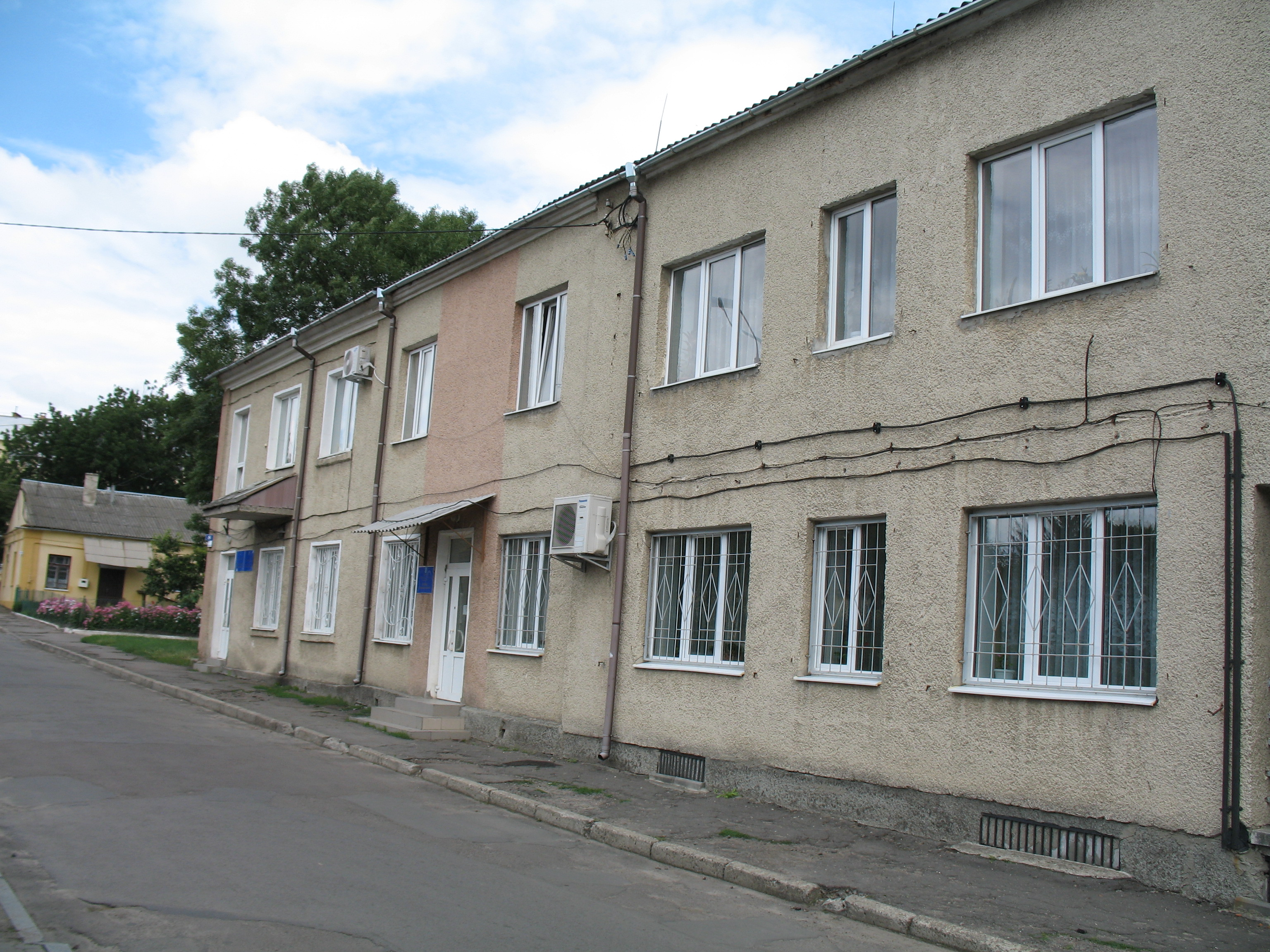 Колишня єврейська лікарня, нині - адміністративні установи